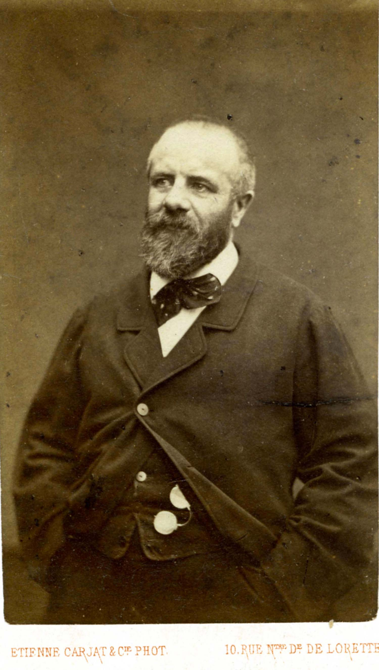 Eugène Pottier photographié par Étienne Carjat.